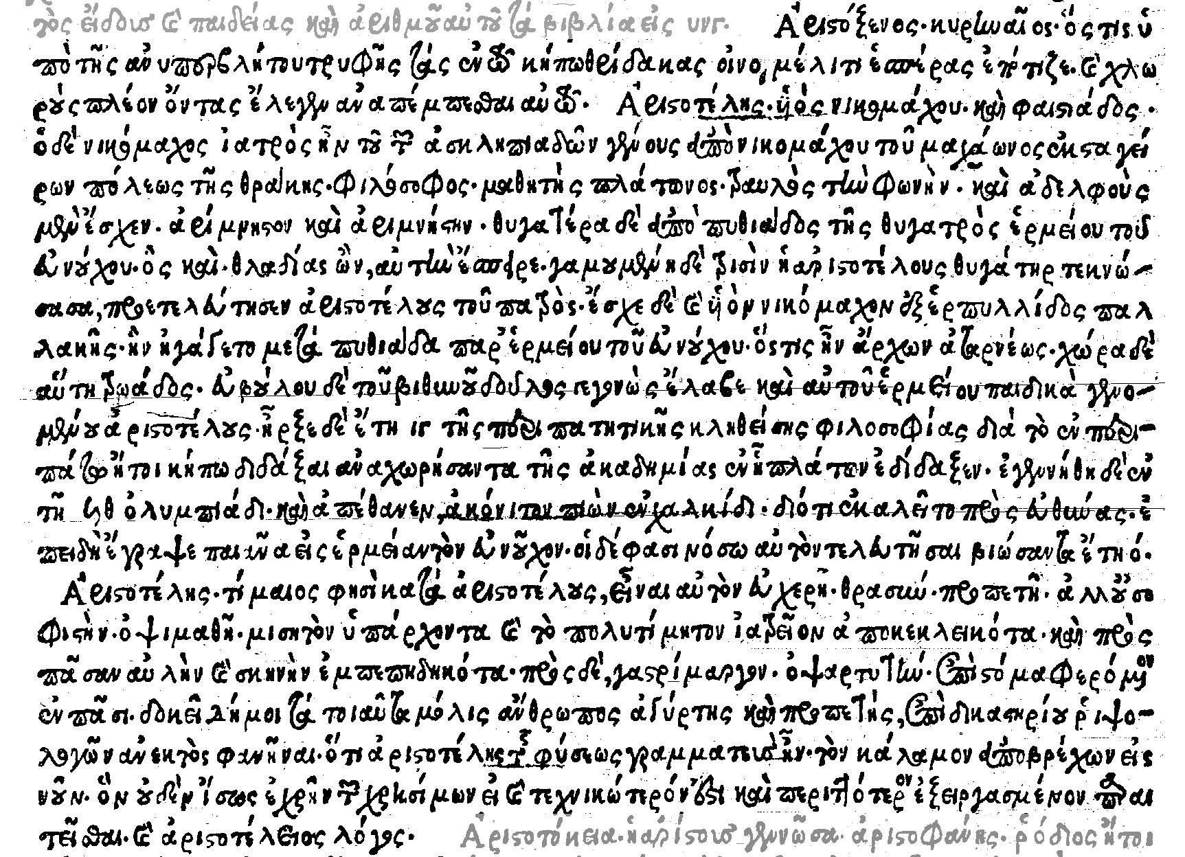 Page d'un ouvrage sur Gallica. Lexicon graecum, p 144.